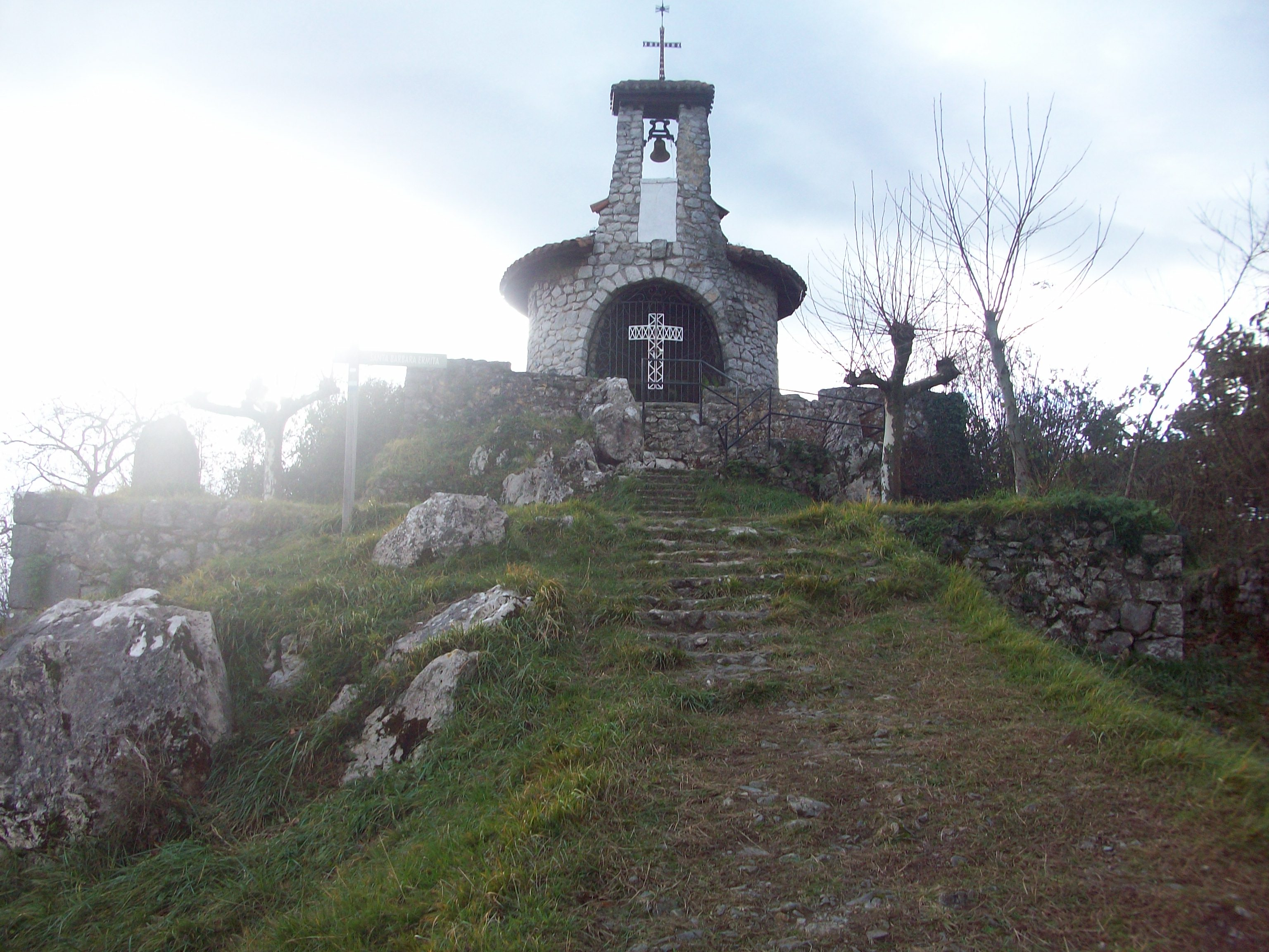 Hernaniko Santa Barbara baseliza. Gipuzkoa, Euskal Herria.